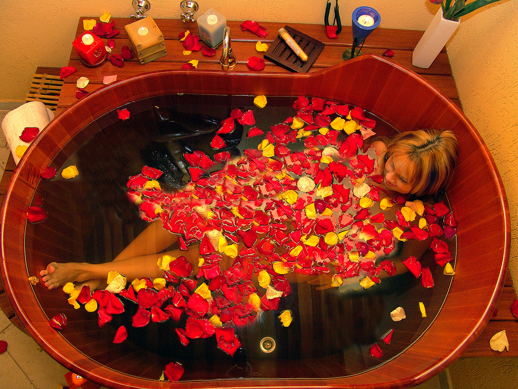 Furo